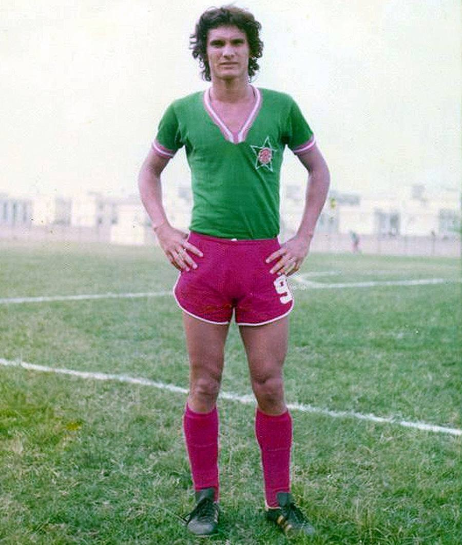 Luizinho iniciando a carreira na Portuguesa(RJ)